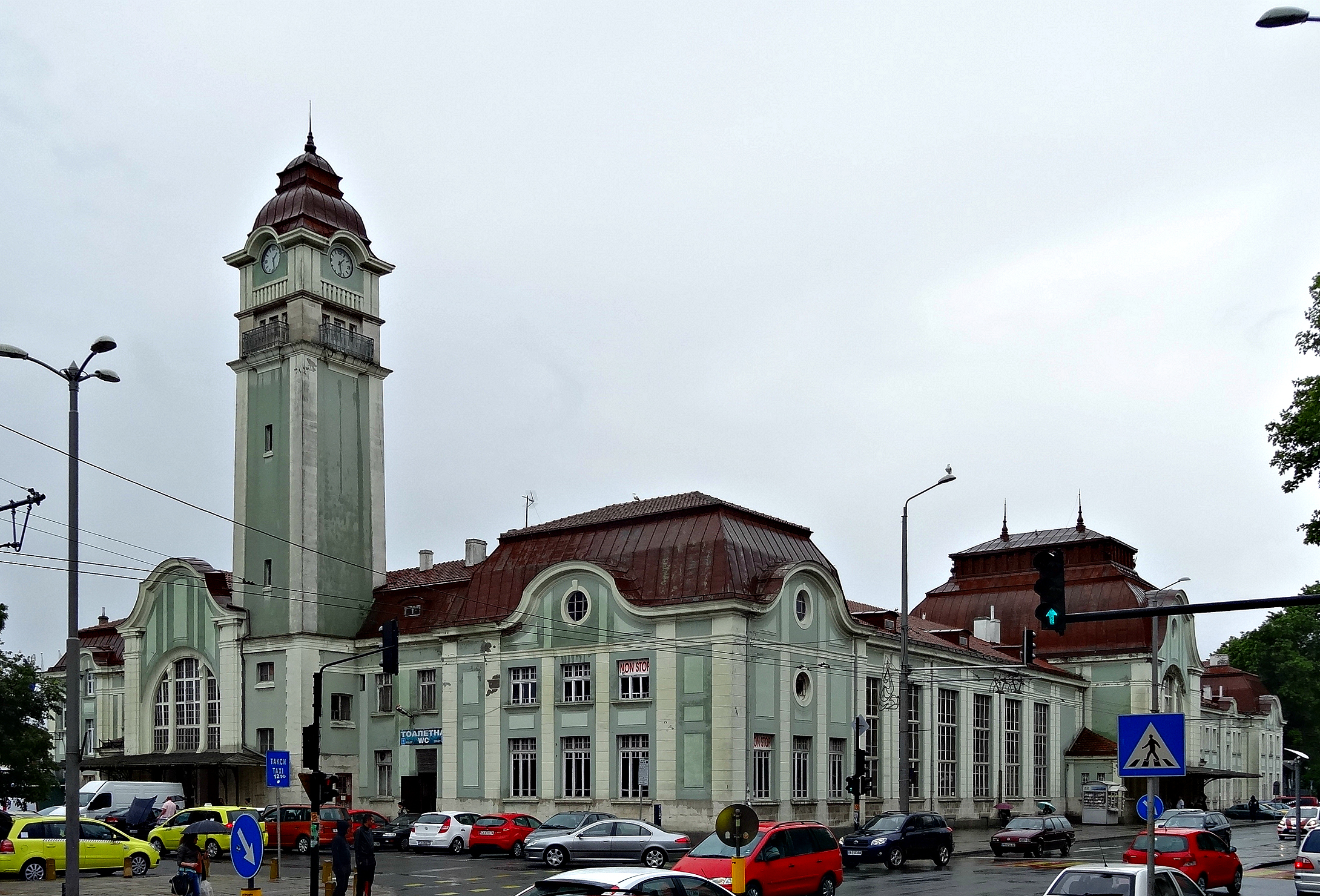 Burgas Central Train Station